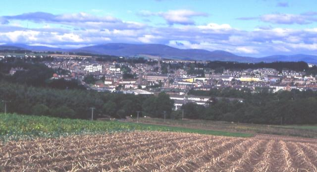 Tattie Field Near Brechin